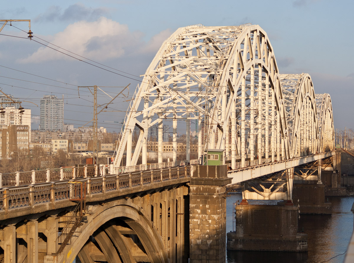 Дарницький міст. Лютий 2011 року.